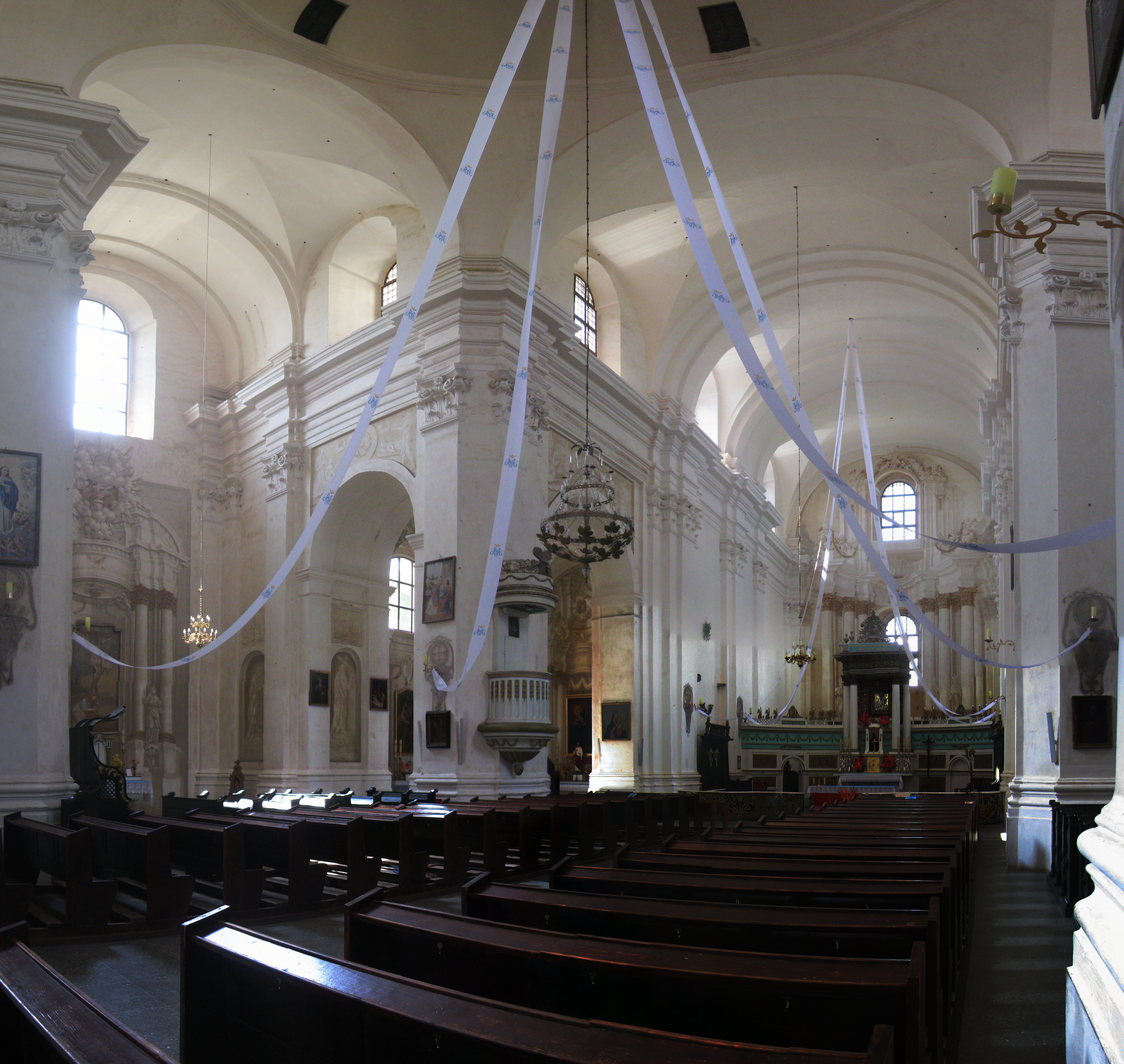 Беларуская (тарашкевіца): Комплекс былога кляштара бэрнардынцаў, дэкаратыўнае аздабленьне касьцёла: галоўны і бакавыя алтары росьпісы. в. Будслаў This is a photo of Belarusian heritage monument. Reference number: 611Г000422 ( WLM)